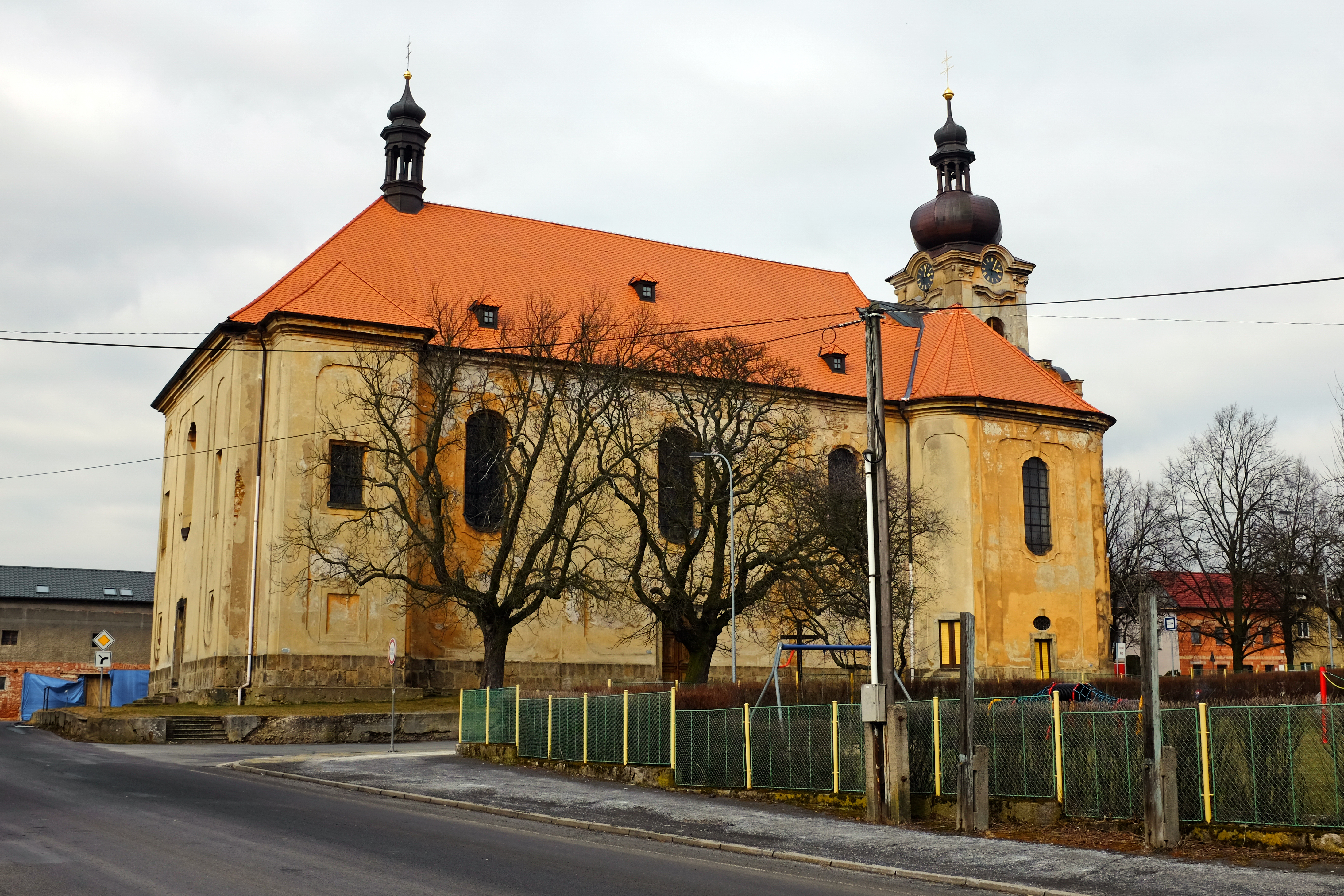 Kostel svaté Anny, st. 21, pp. 57, Sedlec (Karlovy Vary).